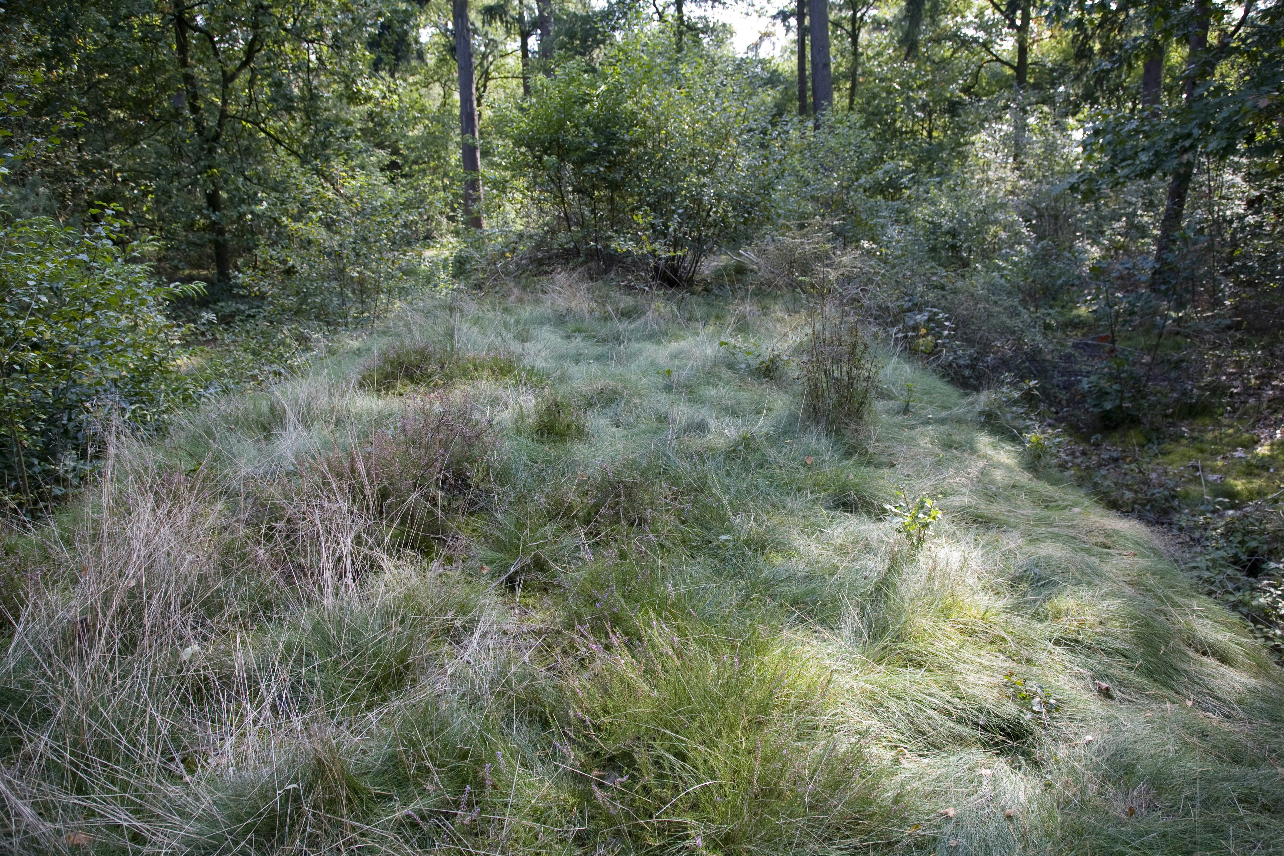 Landweer: Landweer "De Wolfsgraaf", overgroeid en vervallen (opmerking: Gefotografeerd voor TRAP route Swalmen)